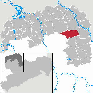 Schildau in Saxony - Landkreis Nordsachsen